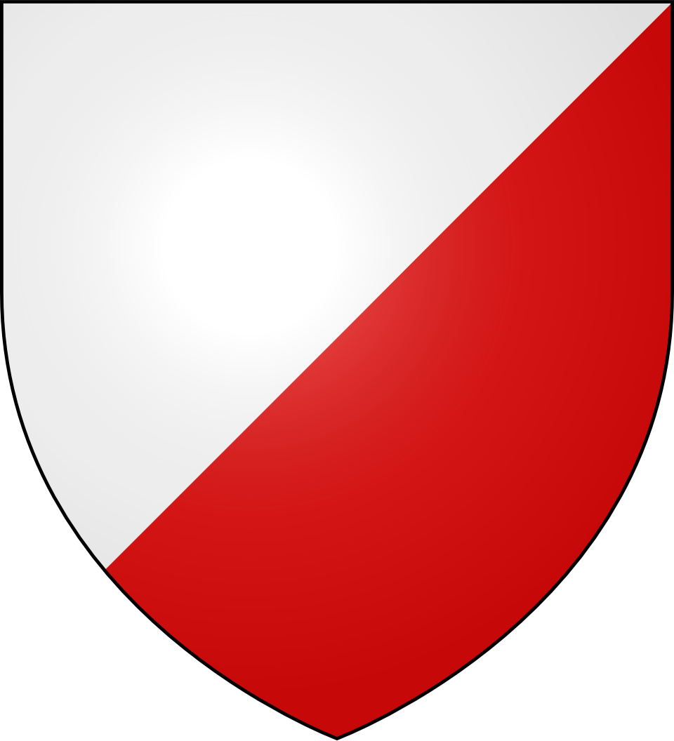 Blason de la ville de Missècle : Taillé d'argent et de gueules